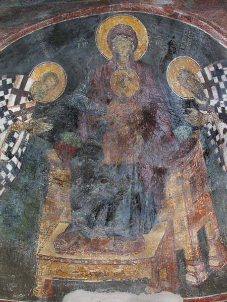 Богородица са Христом у цркви св. Петке у Станичењу